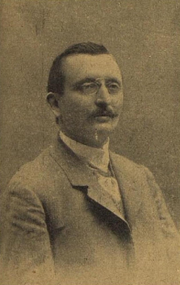 Václav Kotlář (1871-1814), rakouský a český veterinář a politik